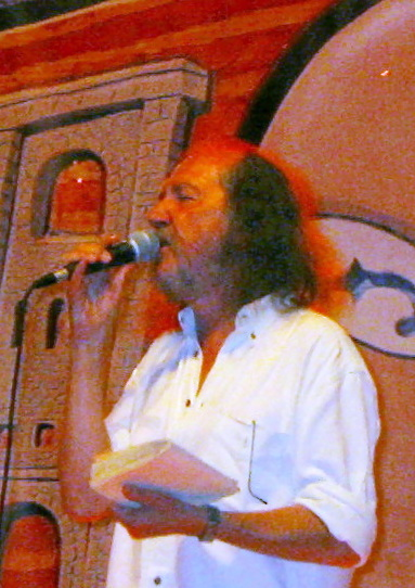 Claudio Lolli in concerto con Il parto delle nuvole pesanti.